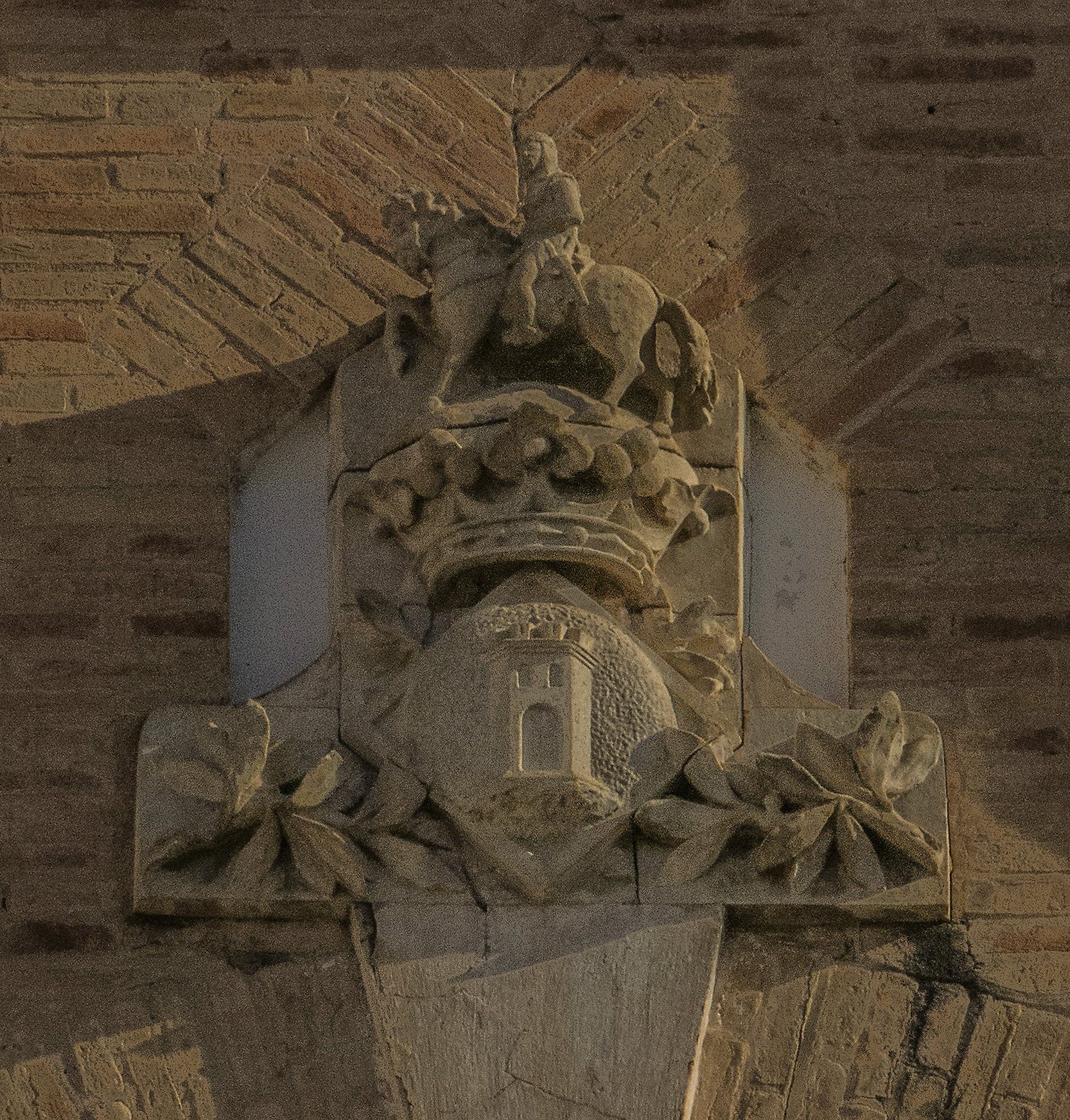 Actualment casa dels jubilats d'Alginet.